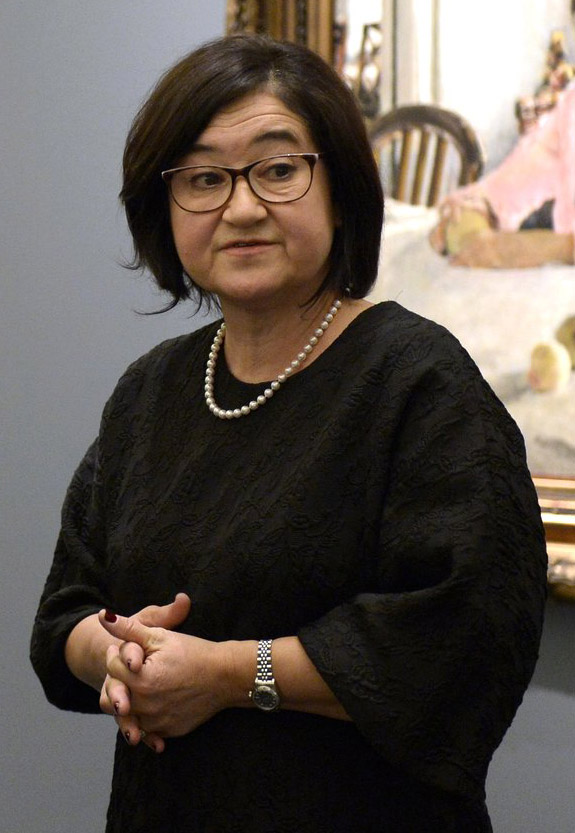 Генеральный директор Государственной Третьяковской галереи Зельфира Трегулова во время посещение Президентом России Владимиром Путиным выставки «Валентин Серов. К 150-летию со дня рождения» в Третьяковской галерее на Крымском Валу в Москве